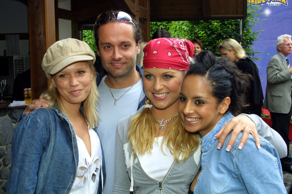 Nova Meierhenrich (Moderatorin Formel 1), Collien Fernandes (Moderatorin Bravo TV), Nicki Juice (Rollergirl / Sängerin), Alex Christensen (Musikproduzent)